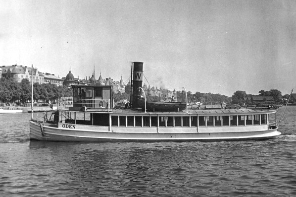 Ångslup ODEN 1953